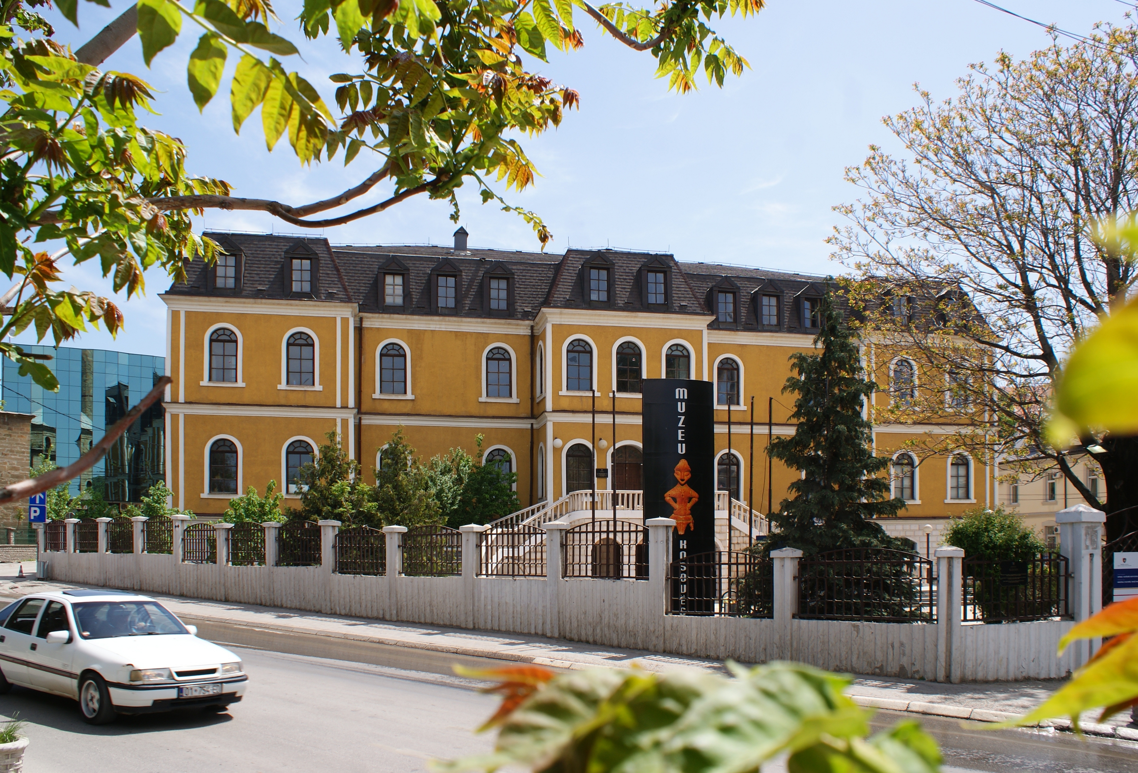 Muzeu I Kosovës